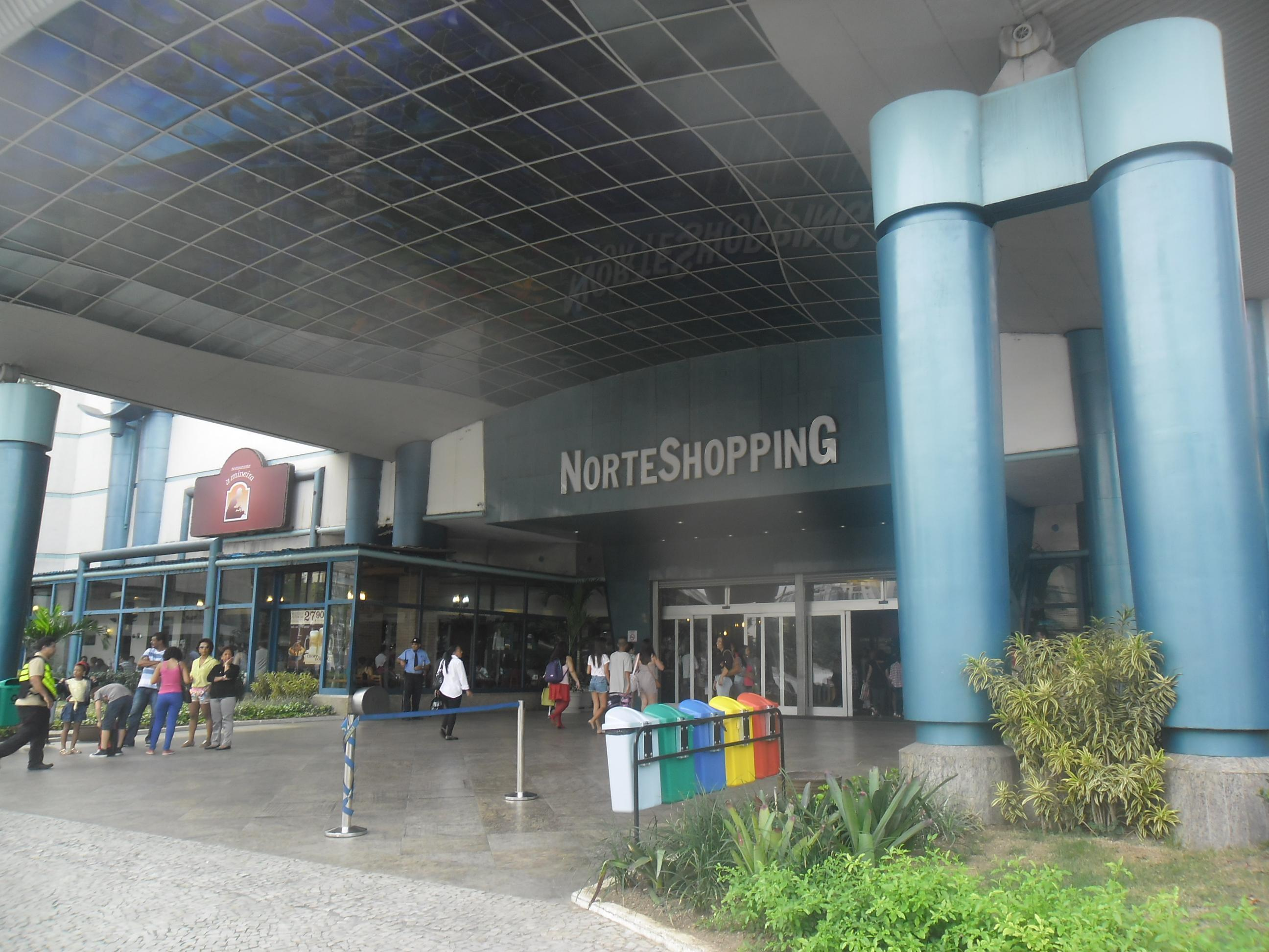 NorteShopping.